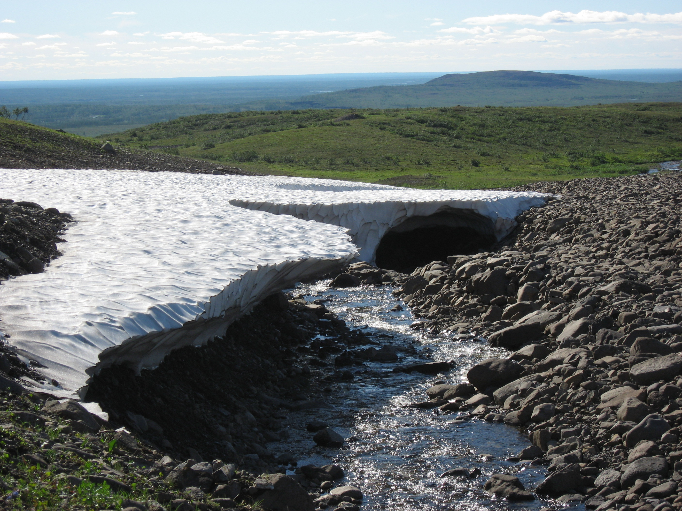 Снежник